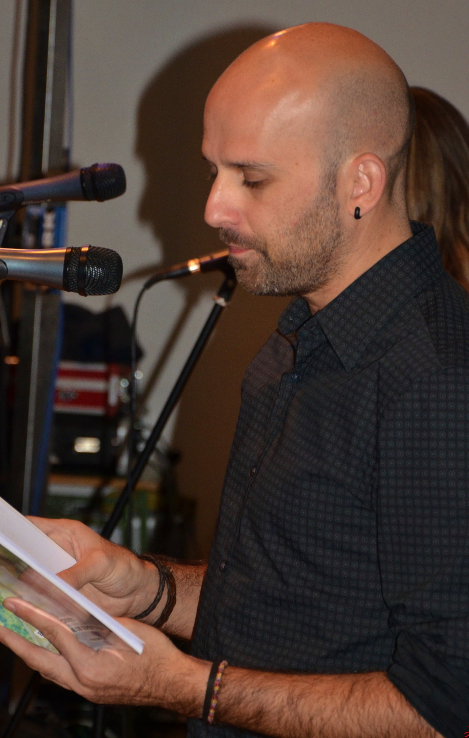 Miguel A. Rincón dando lectura a sus poemas en un recital.